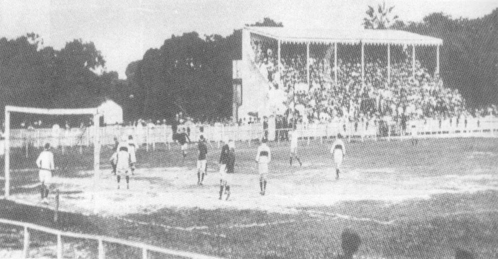 Campo do Prado, in Fortaleza, Brasil.